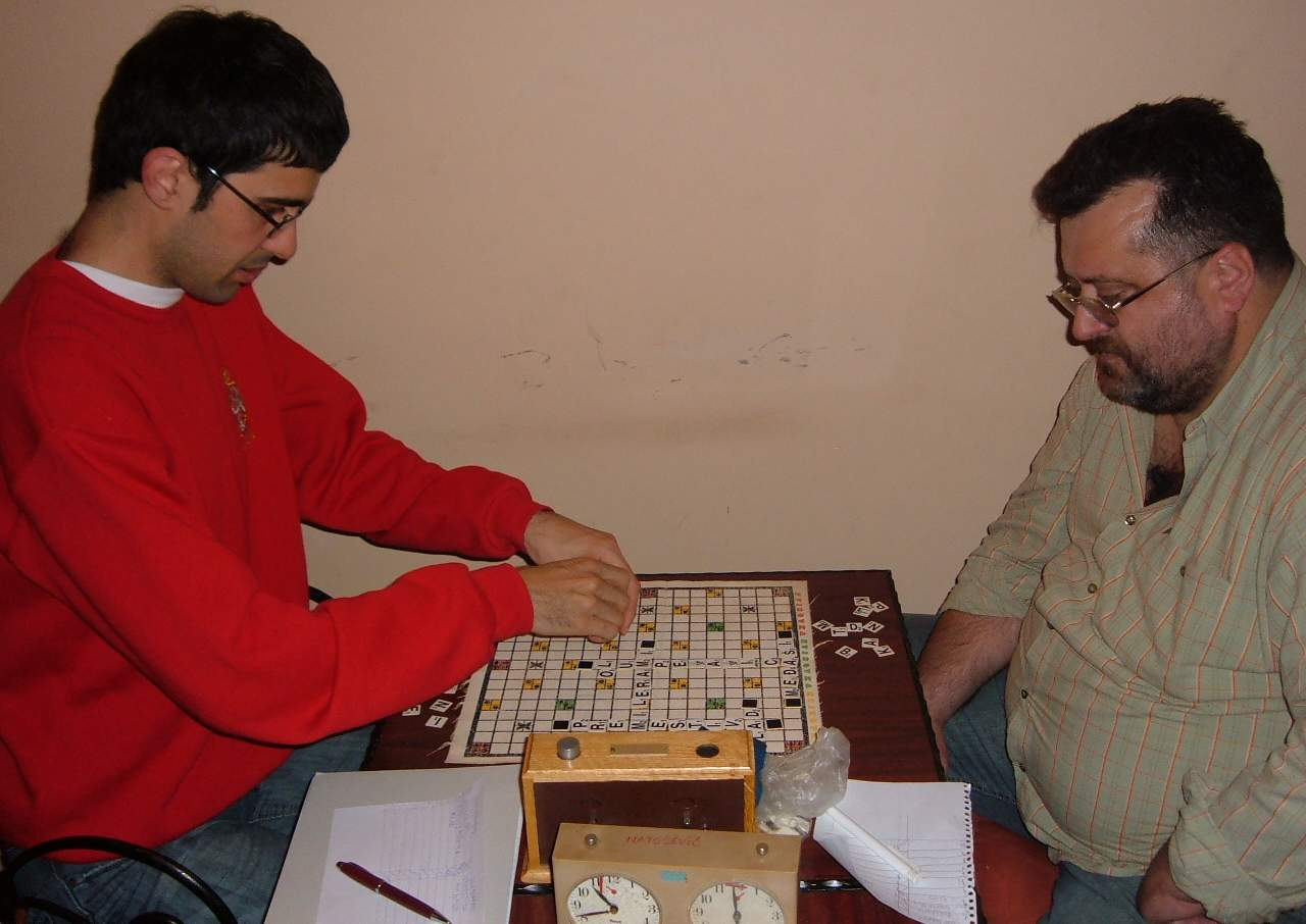 Prvenstvo Srbije u kvizovci, 2008.